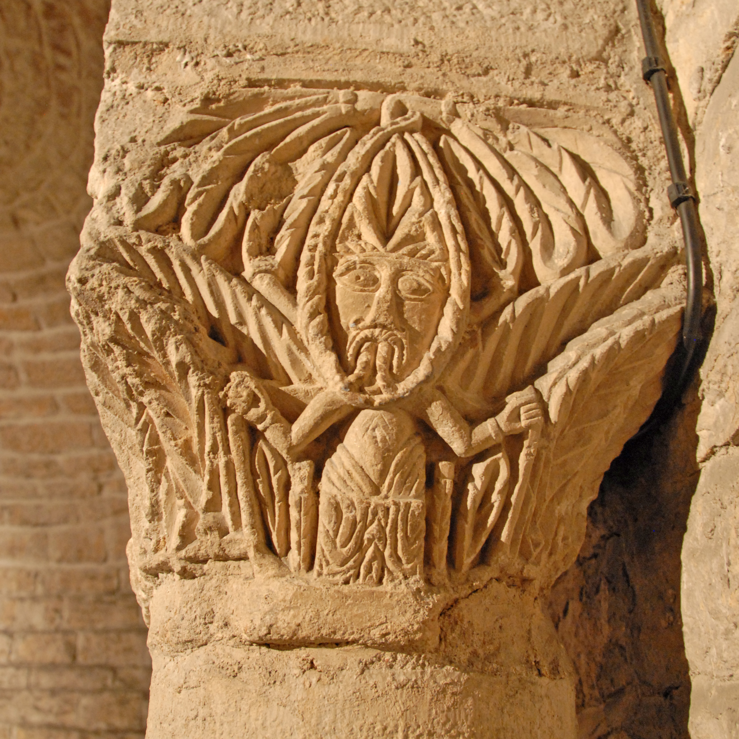 St-Bénigne, Krypta, Kapitell